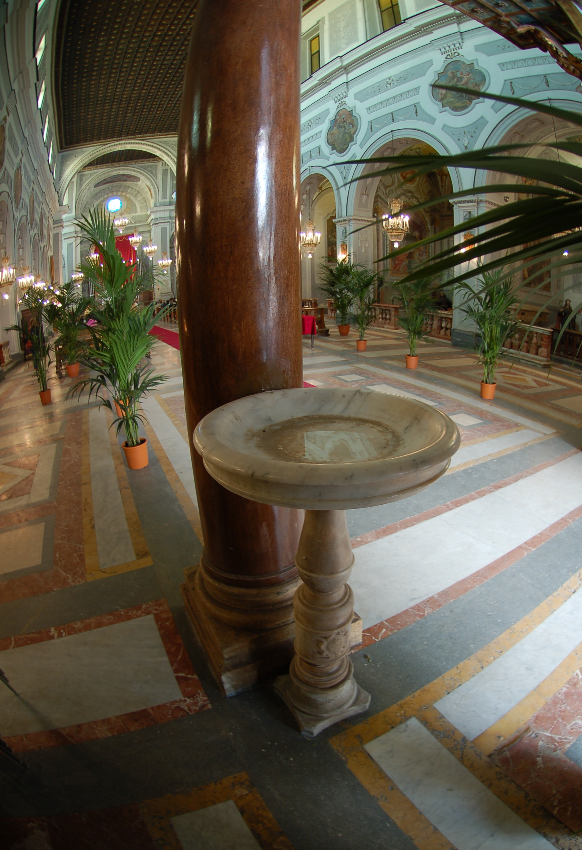 Palermo, ITA